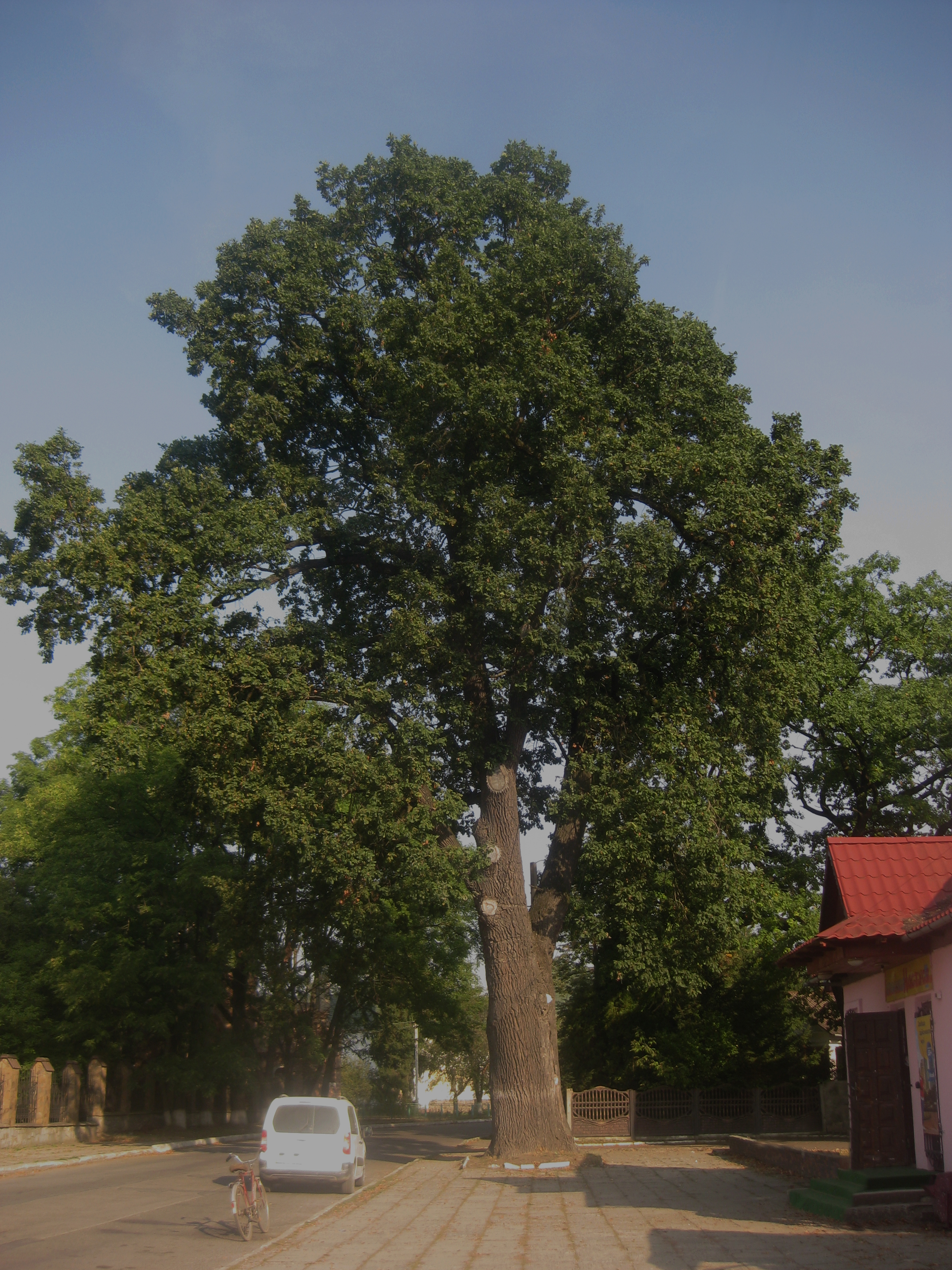 «Дуб Івана Франка», Коломийський район, м. Коломия, вул. Івана Франка, біля буд. № 40